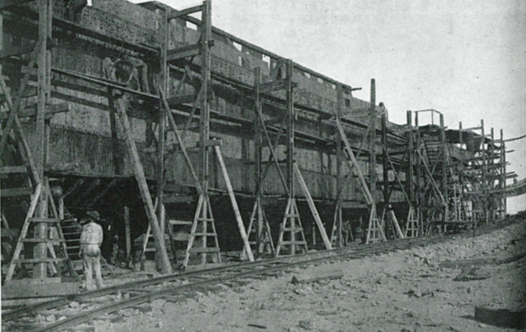 Construção do vapor "Itaguassú" (grafia original) nos estaleiros da "Companhia Nacional de Navegação Costeira" pertencente à "Casa Lage & Irmão", na Ilha do Viana, município de Niterói, estado do Rio de Janeiro, Brasil.